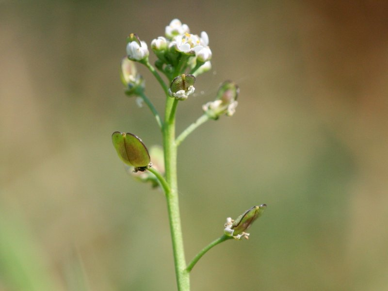 Bauernsenf (Teesdalia nudicaulis)